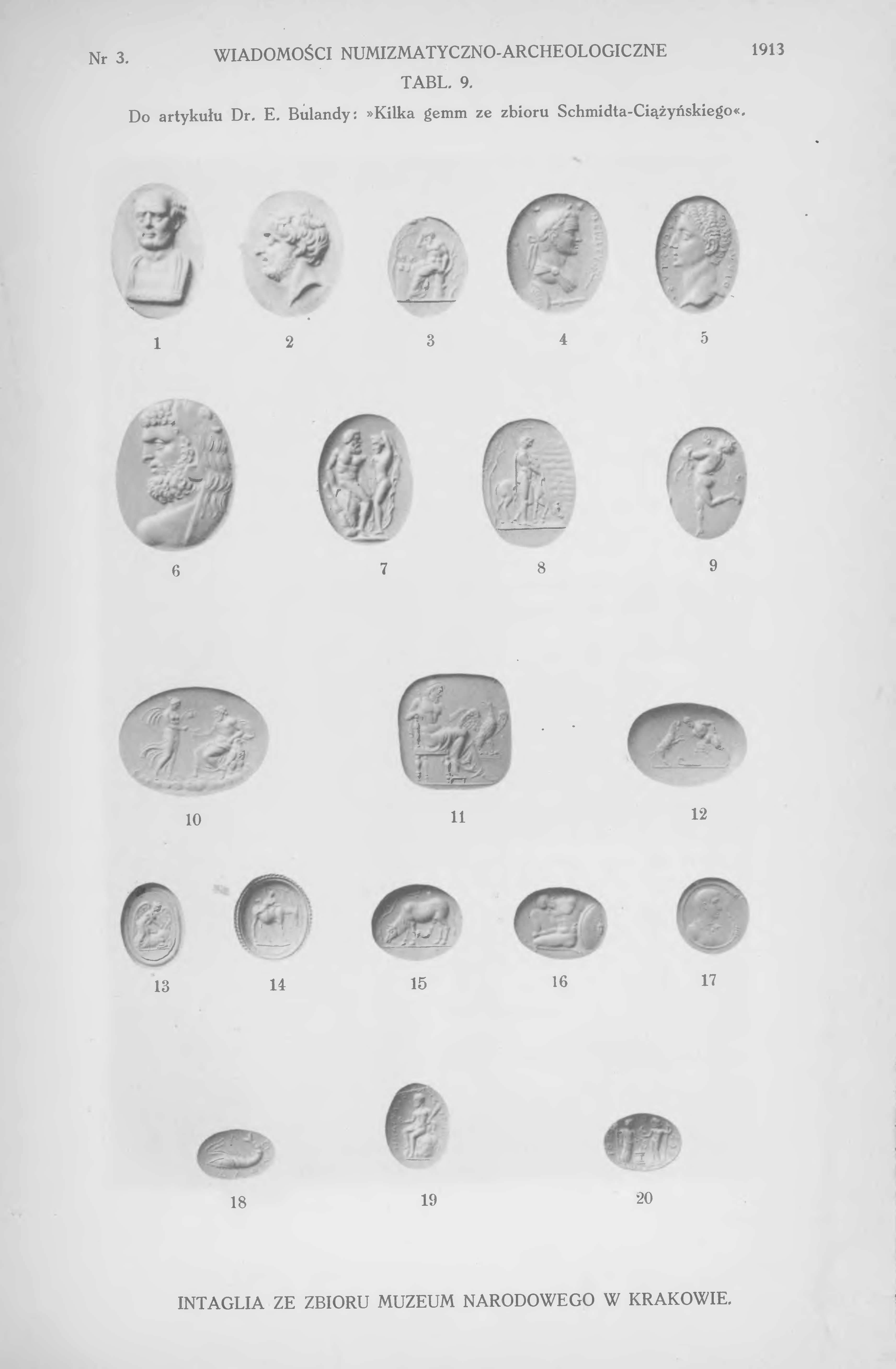 Przykładowe intaglia ze zbioru Konstantego Schmidta-Ciążyńskiego